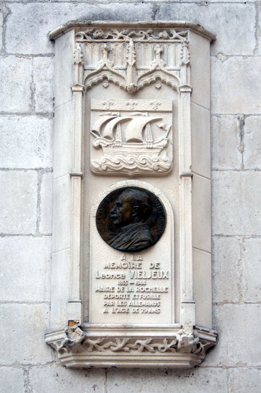 Hotel de ville de La Rochelle